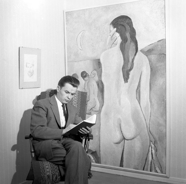 Kuvataiteilija Eeli Aalto (s. 1931) vuonna 1960.